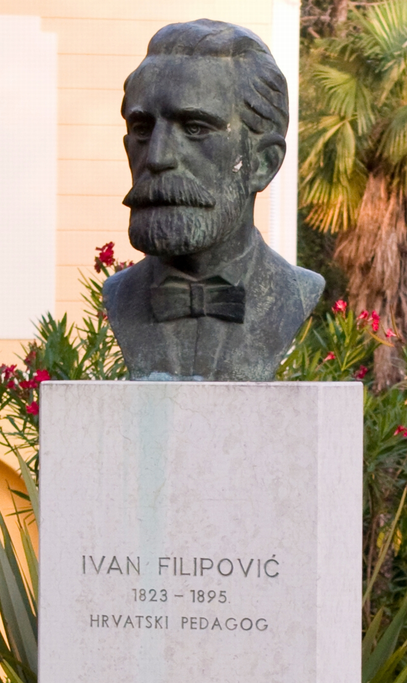 spomenik Ivanu Filipoviću u Crikvenici